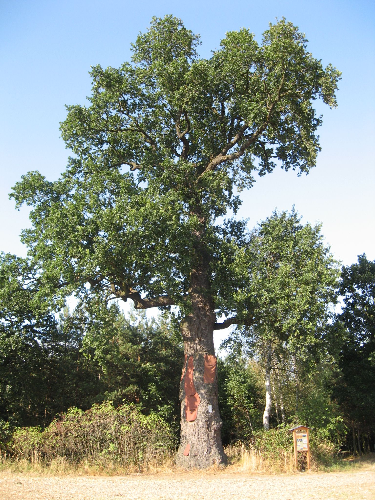 Struhalův dub (srpen 2015)